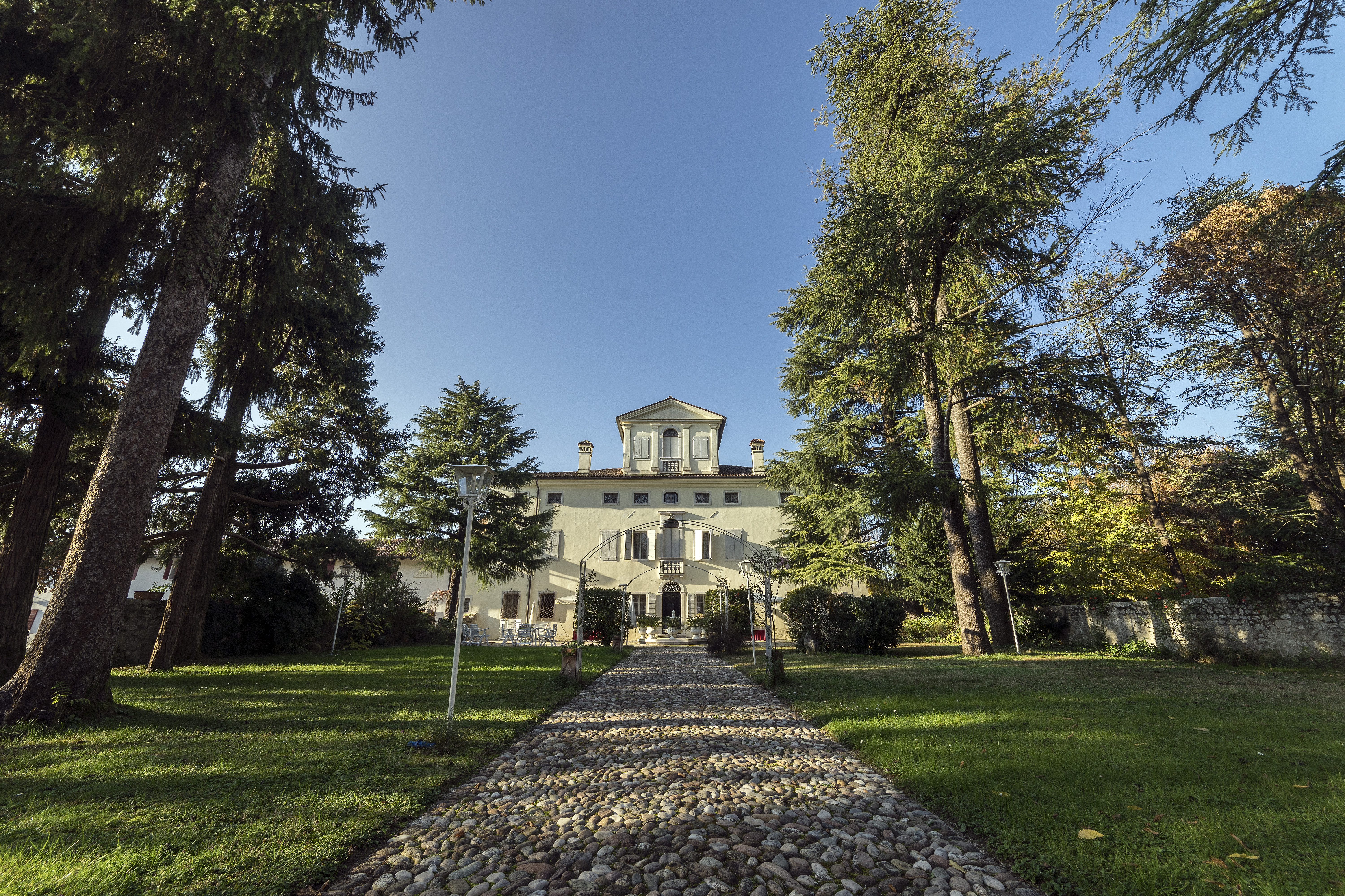 Veduta frontale di Villa Cigolotti su ingresso principale e campiello.